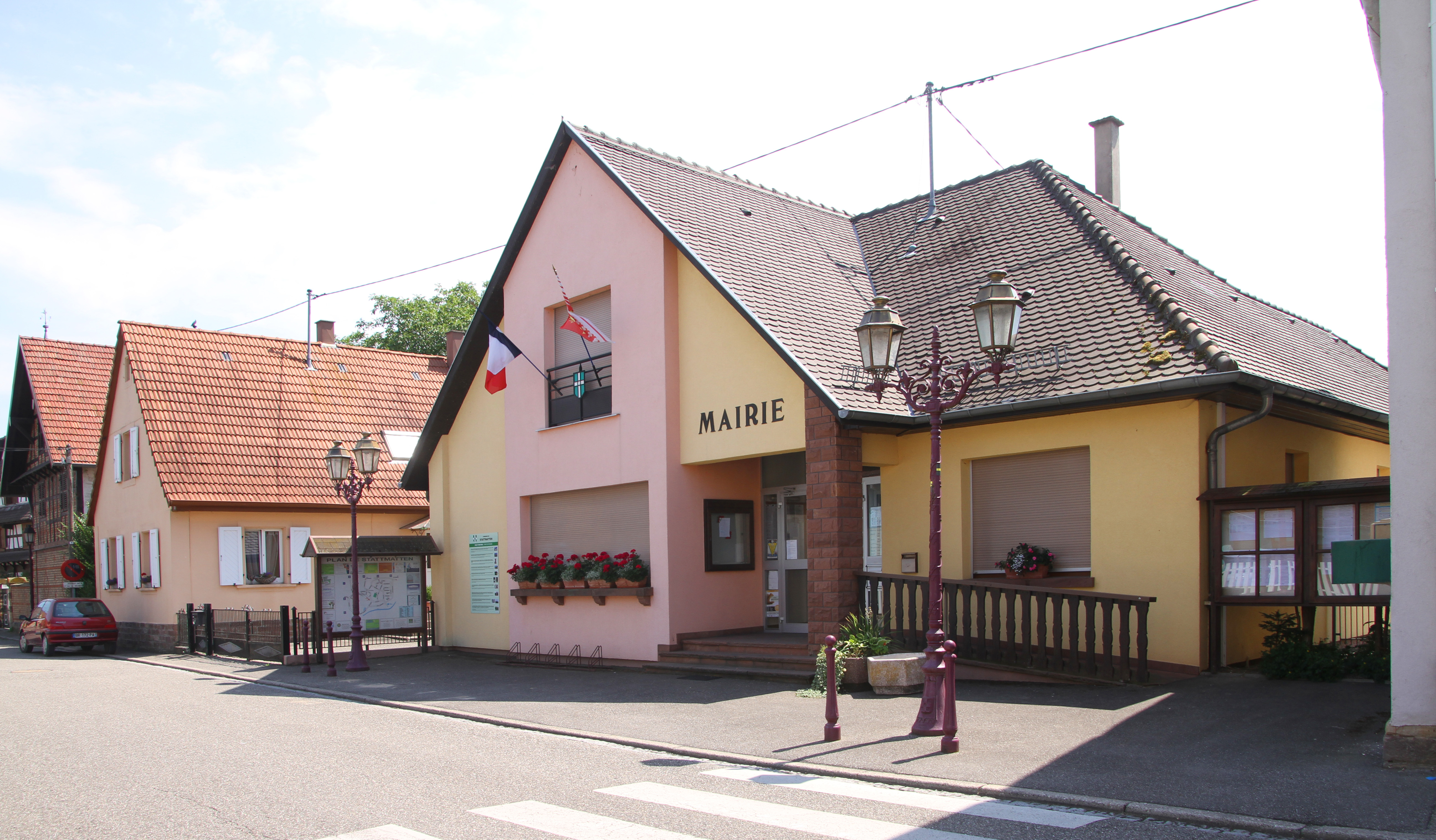 Stattmatten